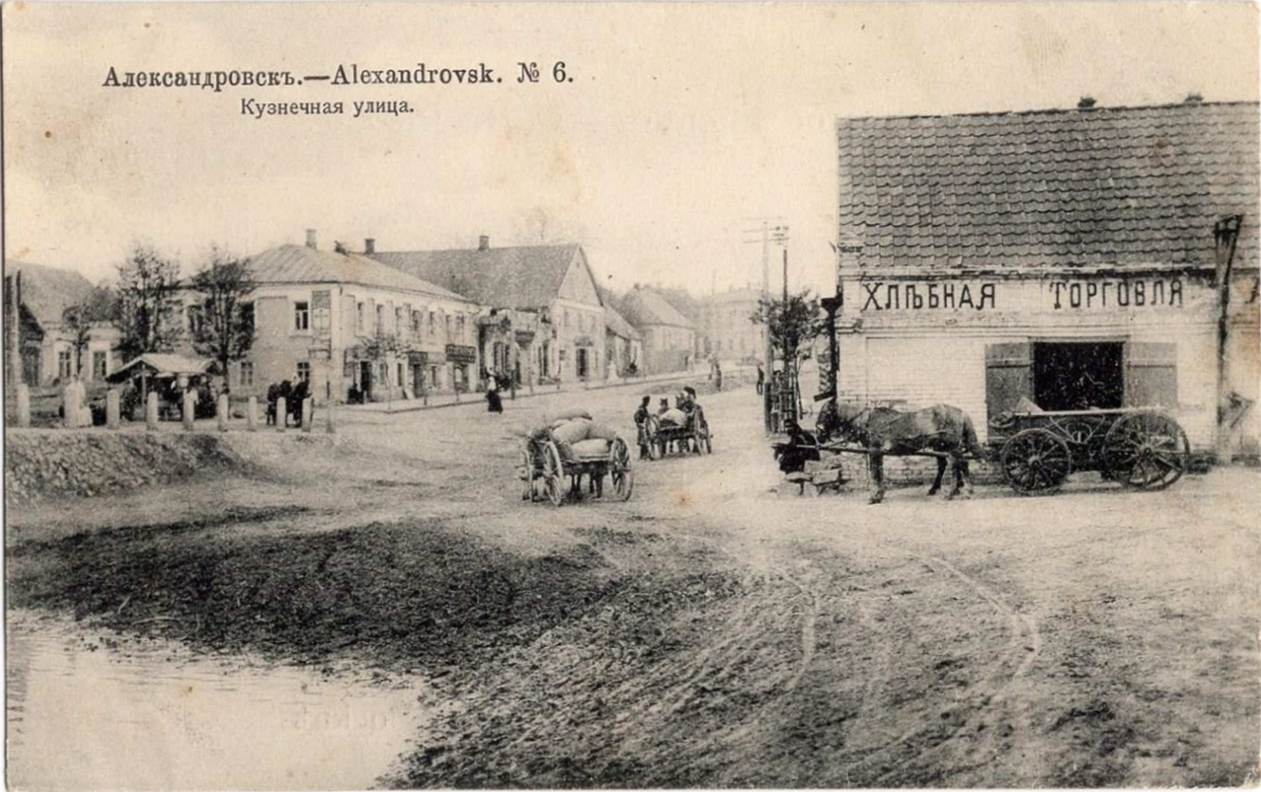 Вид Александровска в конце 19 века. Улица Кузнецкая